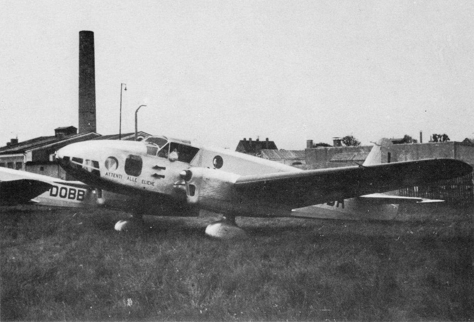 Caproni Ca.309 Ghibli, aereo militare multiruolo bimotore monoplano, data e luogo della scatto imprecisati.